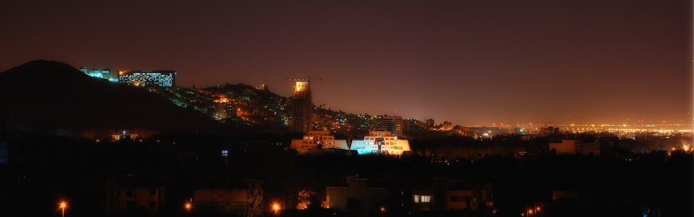 Shiraz/Iran